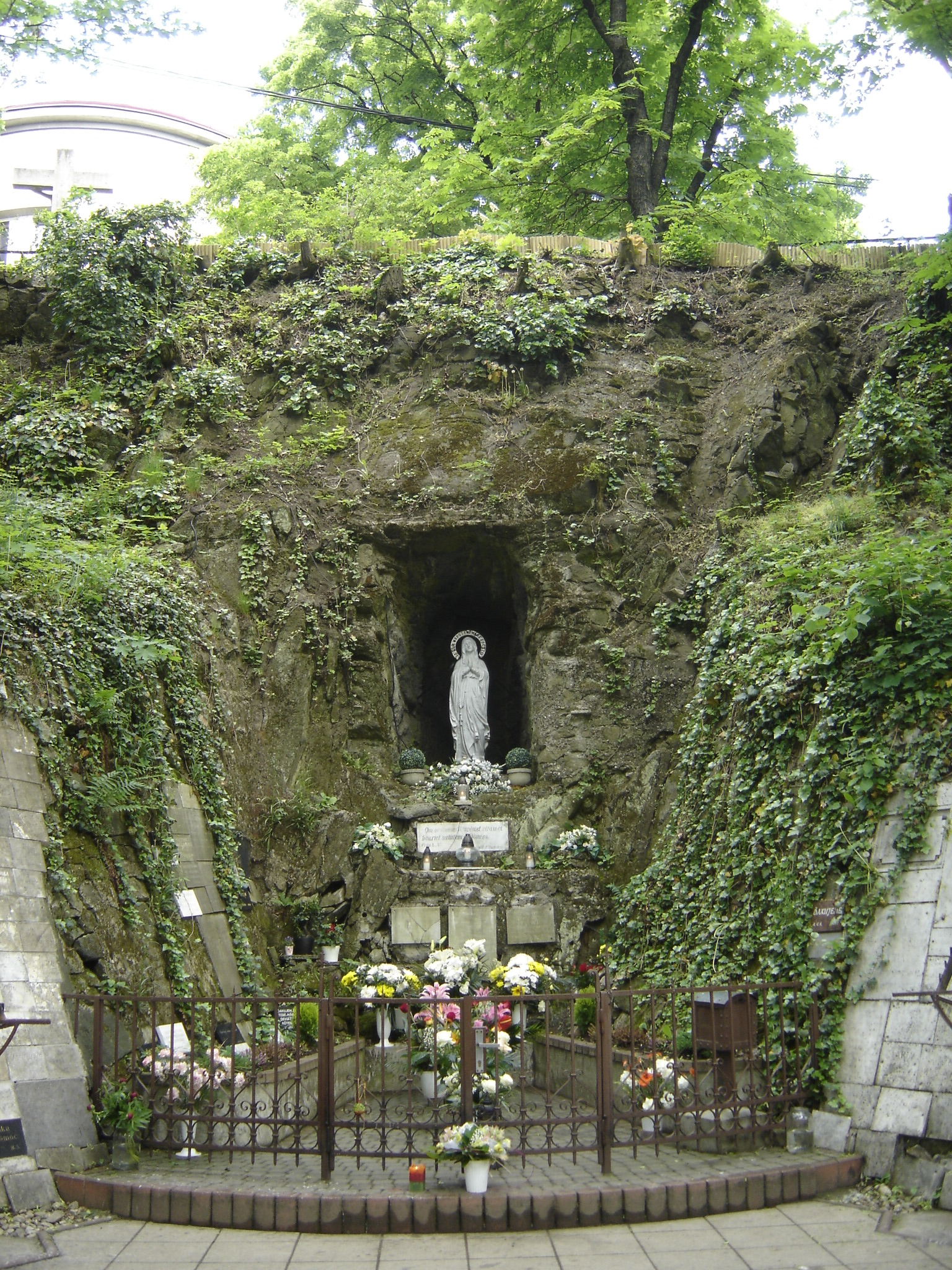 Lurdská jaskyňa (Bratislava)